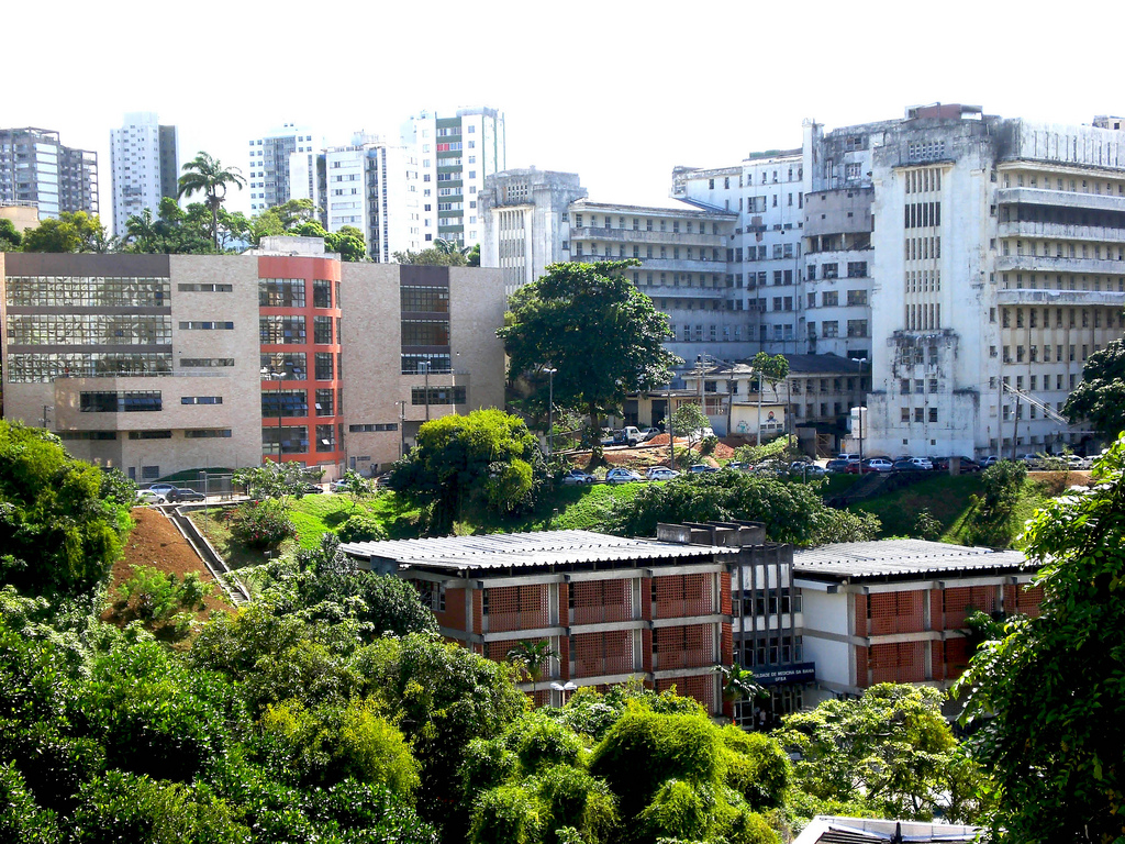 Biblioteca em Construção, Hospital Universitário e PA da FAMEDUFA